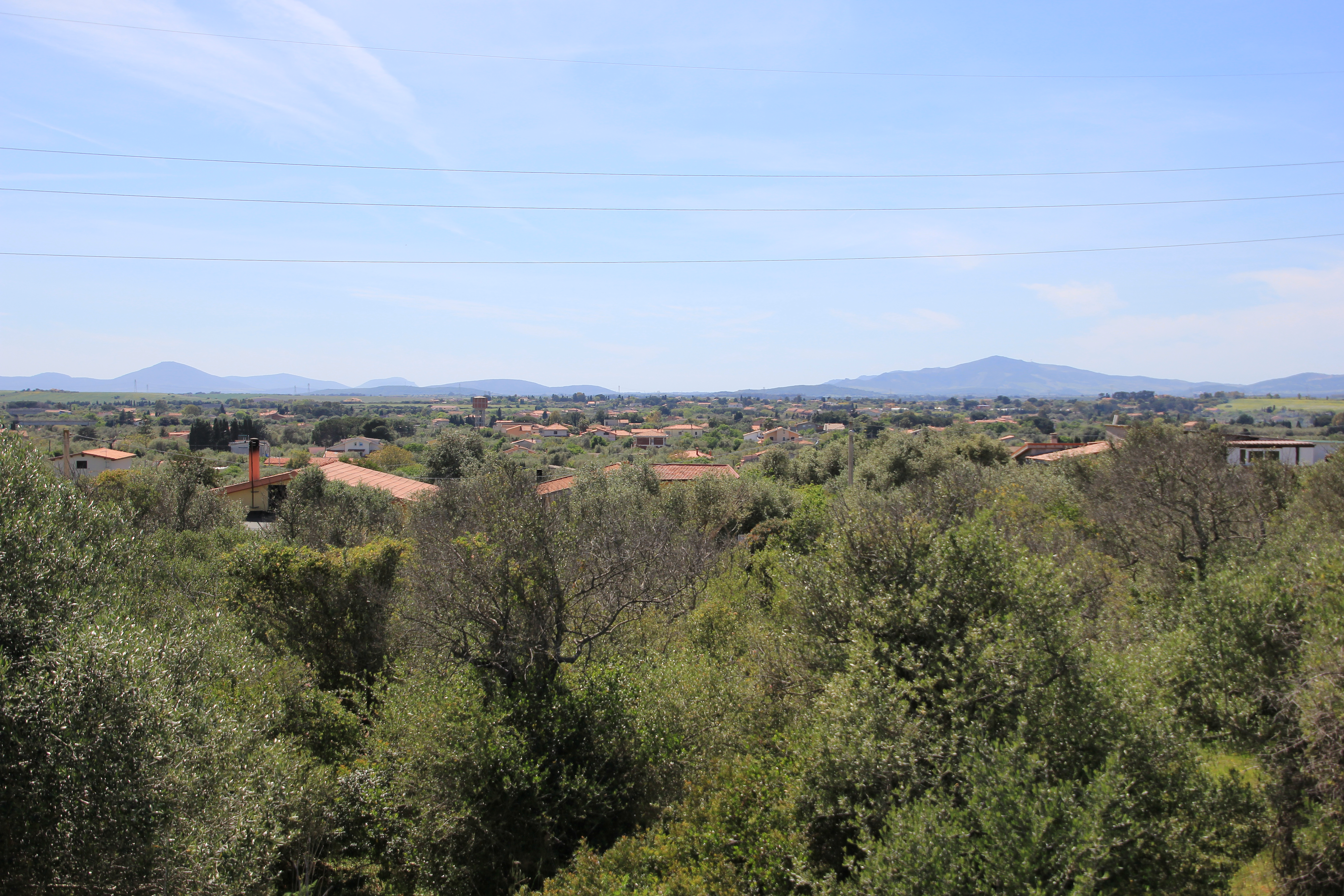 Sassari - Bancali